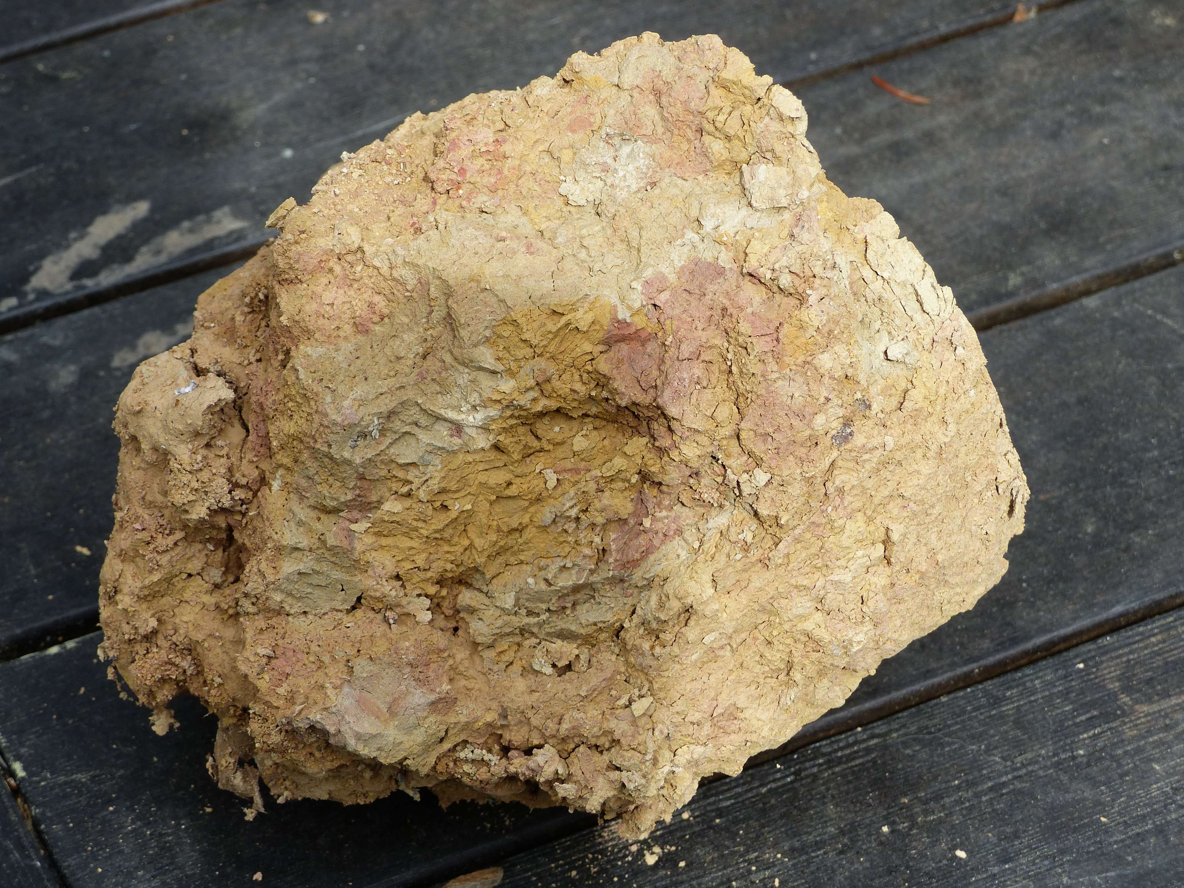 A felvétel 2018. április 24-én készült Budapesten. A Budaörs északi részéről (Farkashegy), az Erdész utca legfelső szakasza mellől származó, áprilisban gyűjtött alapkőzet: bryozoás márga.